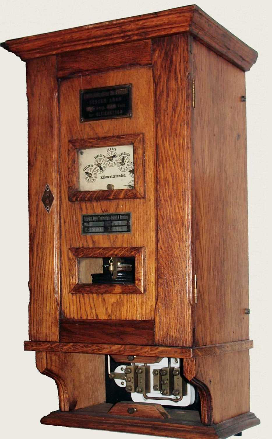 Gleichstromzähler - DC electric meter